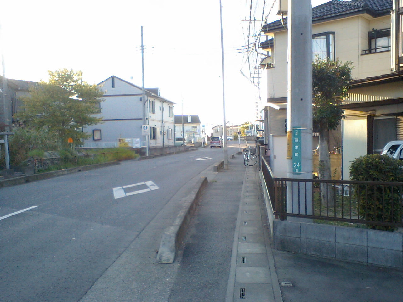 埼玉県川越市藤木町24番地付近。